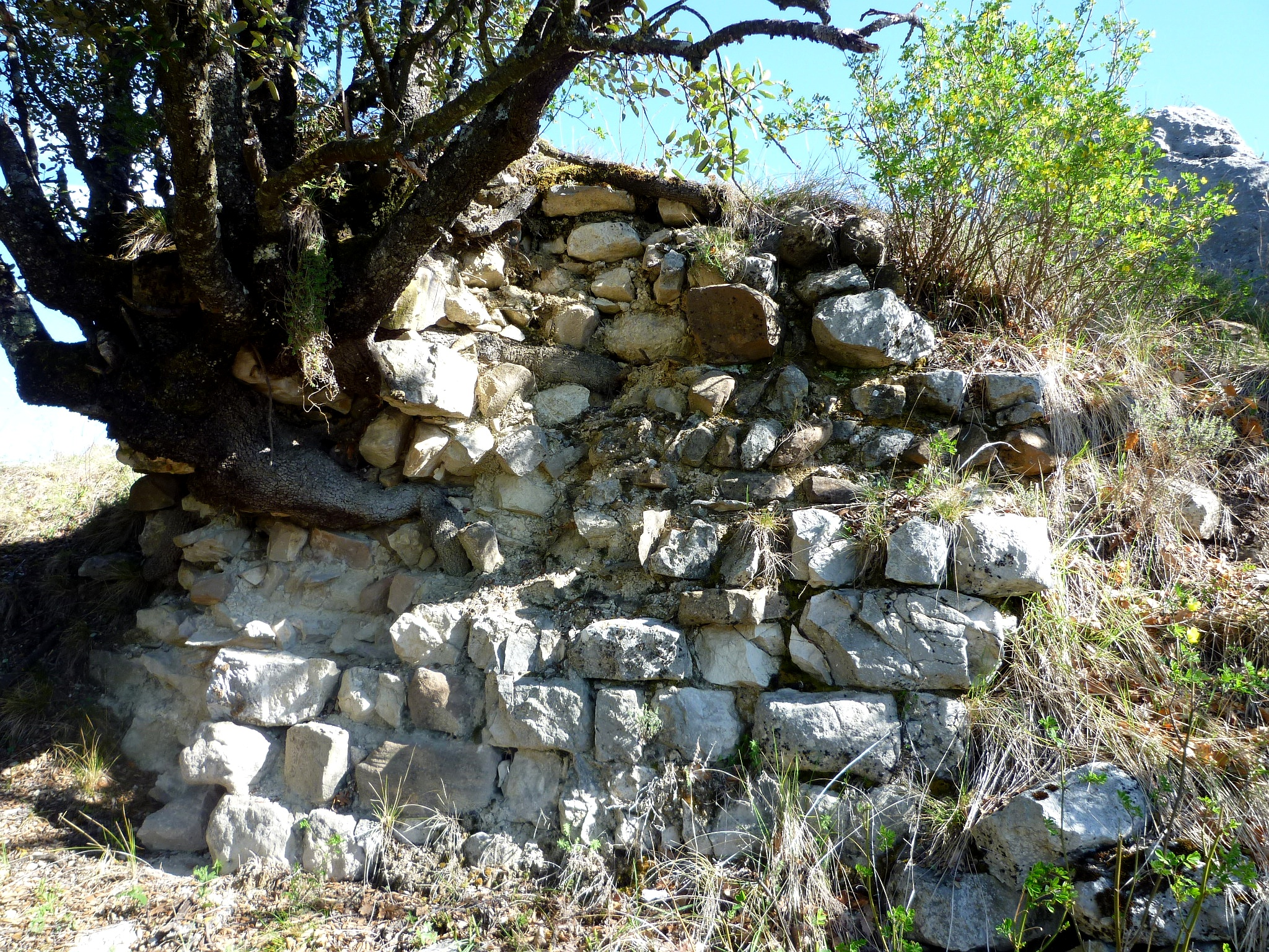 Únics vestigis del Castell de Sisquer, dalt del Serrat